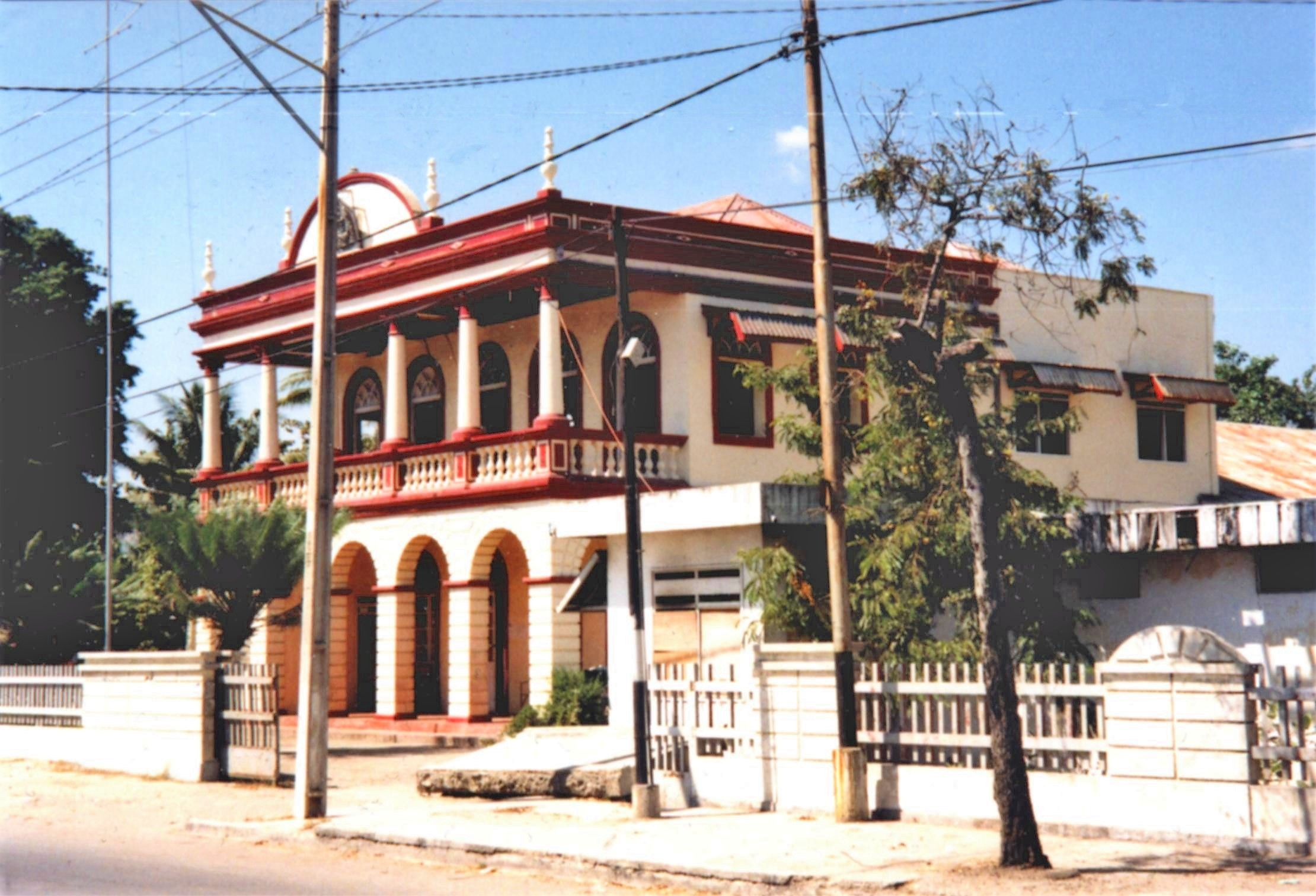 Associação Comercial Chinesa, Dili, Timor-Leste